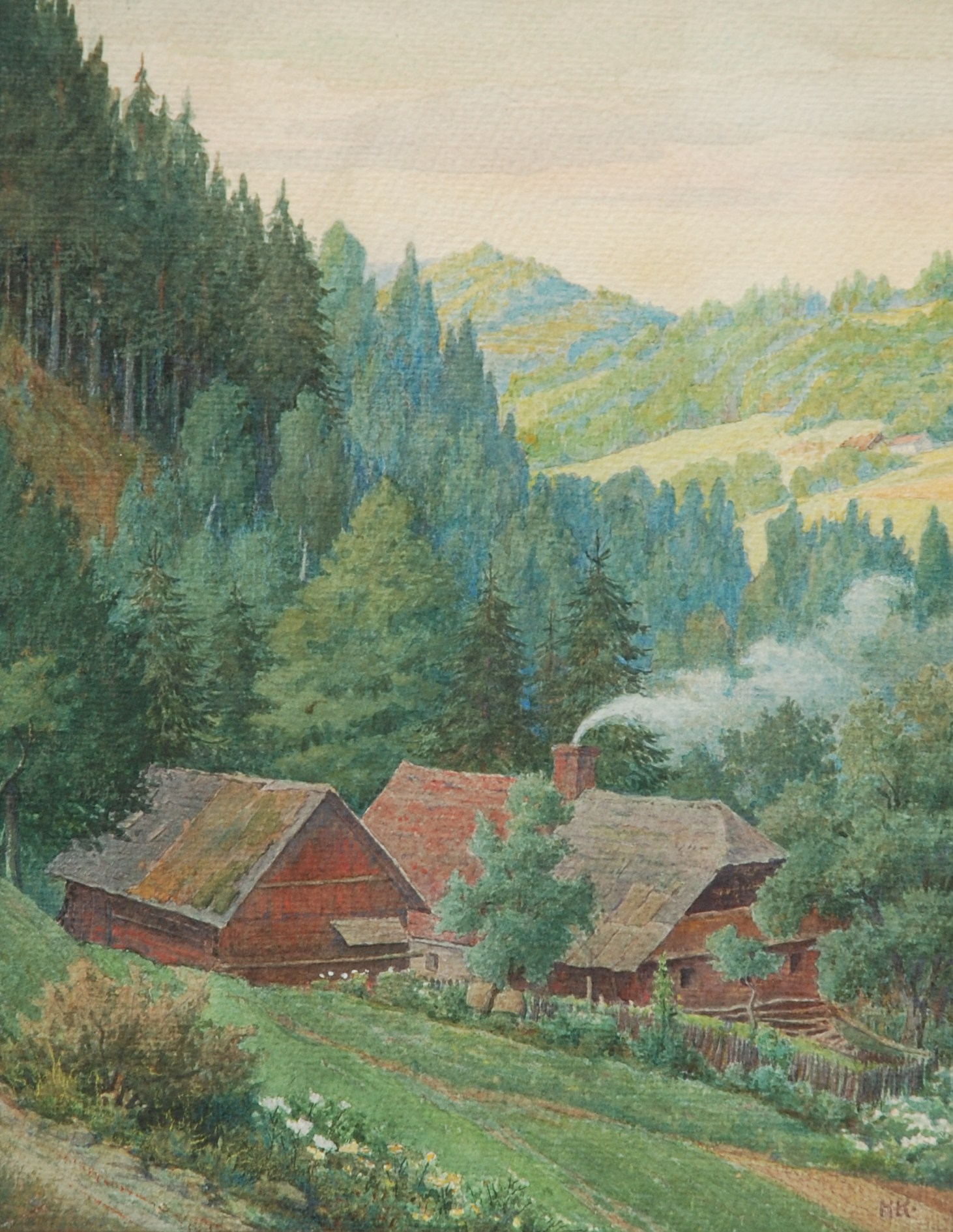 Steirische Landschaft mit Gehöft, Aquarell auf Papier, 28,5 cm x 21,5 cm